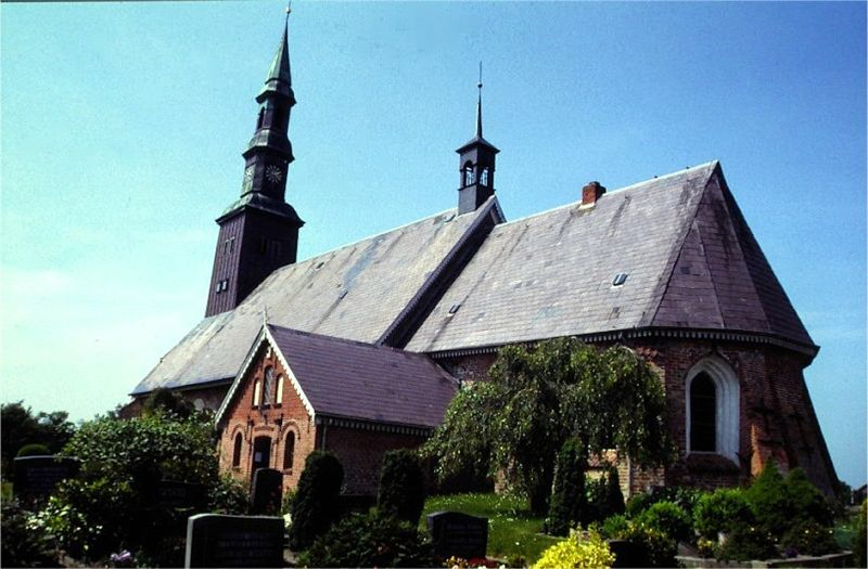 Tating Kirke i Sydslesvig. Tating kirke